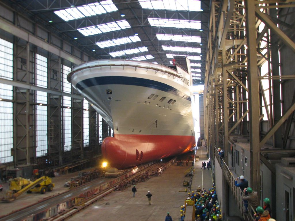 Flensburger Schiffbau Gesellschaft